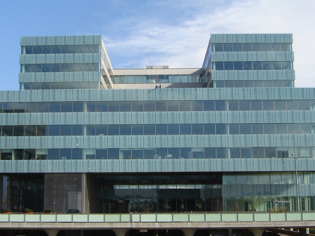 Kantoorgebouwen PlazaArena, Amsterdam Zuidoost